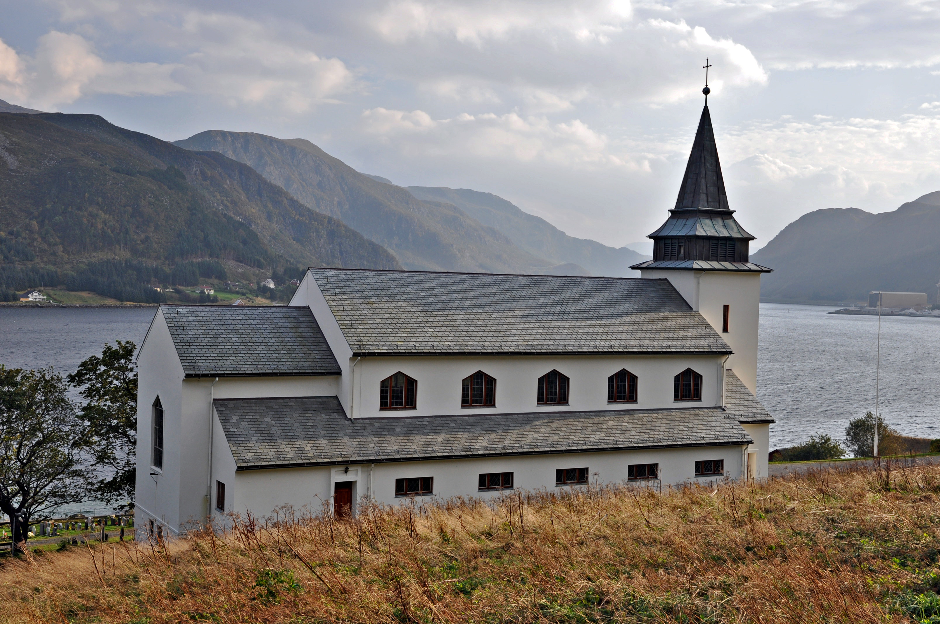 Nord-Vågsøy kyrkje ligg på Raudeberg i Vågsøy kommune, Sogn og Fjordane. Kyrkja står på Røysaneset, ved innseglinga til Ulvesundet frå nord. Der stod også den gamle kyrkja på Nord-Vågsøy som brann ned etter lynnedslag i 1945. Noverande Nord-Vågsøy kyrkje er ei langkyrkje bygd i betong. Biskop Ragnvald Indrebø vigsla kyrkja i 1960. Arkitekt for bygget var Ole Halvorsen. Kjelder: NRK Sogn og Fjordane, Vågsøy sokneråd GPS-posisjon: 61.59.18 N, 5.09.07 Ø